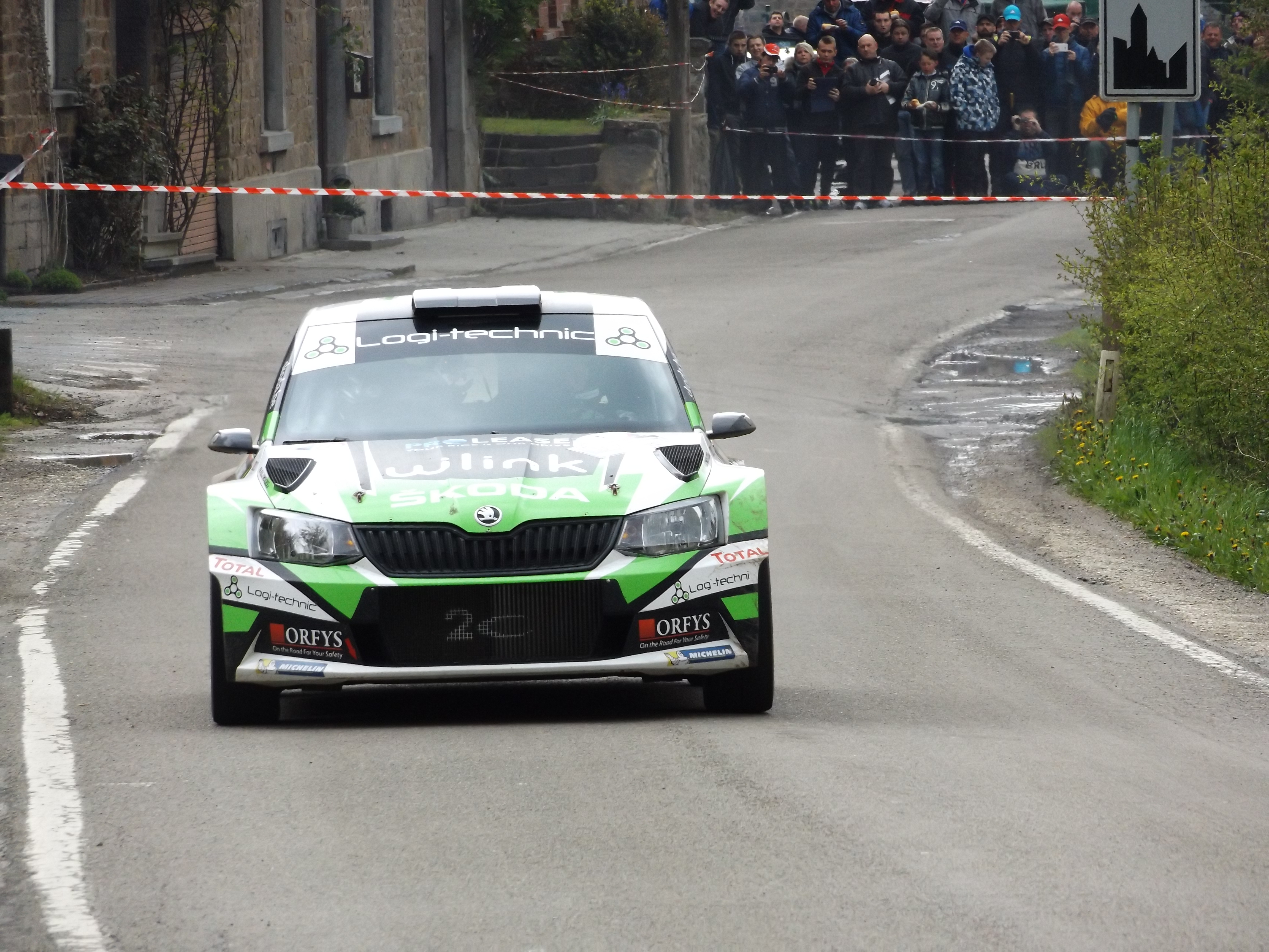 Freddy Loix Wallonie 2016